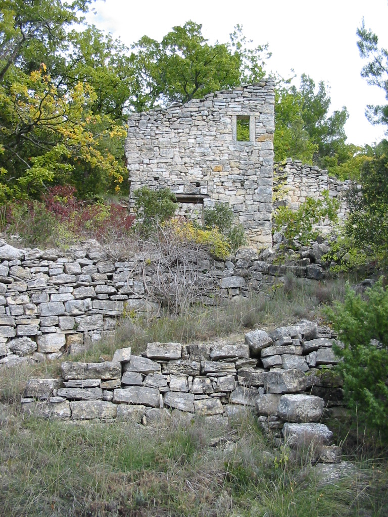 Ruine de la Brune à Murs